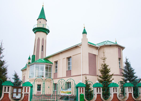 Мечеть Тынычлык город Казань